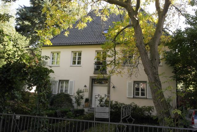 Haus Huchting in Bremen, Wachmannstraße 115Das abgebildete Objekt ist ein geschütztes Kulturdenkmal in der Freien Hansestadt Bremen, mit der Nr. 1190 beim Landesamt für Denkmalpflege registriert.